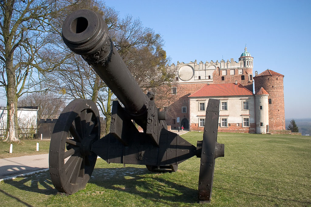 Golub-Dobrzyń castle. Author: Adam Kumiszcza